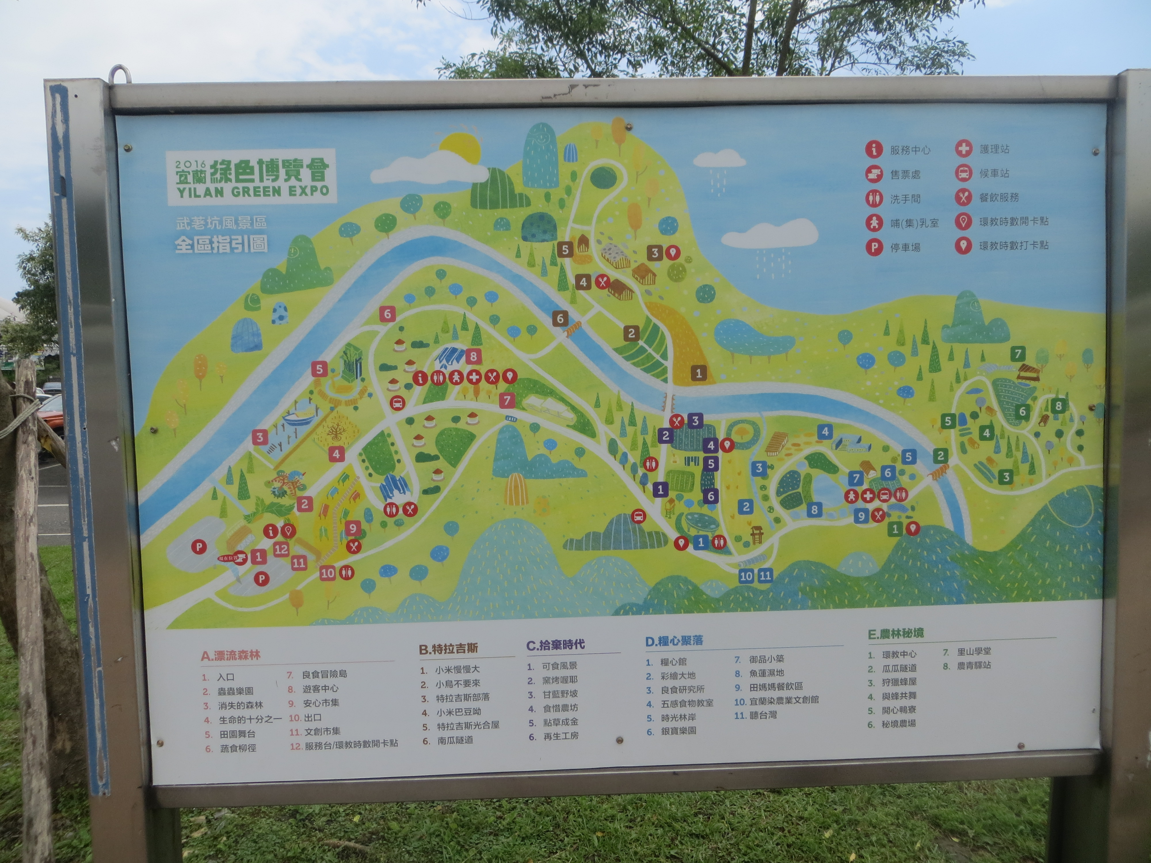 2016年5月12日，宜蘭綠色博覽會期間，當地會場的導覽地圖。